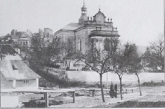 Бучацький костел Внебовзяття Пресвятої Діви Марії ХІХ ст.